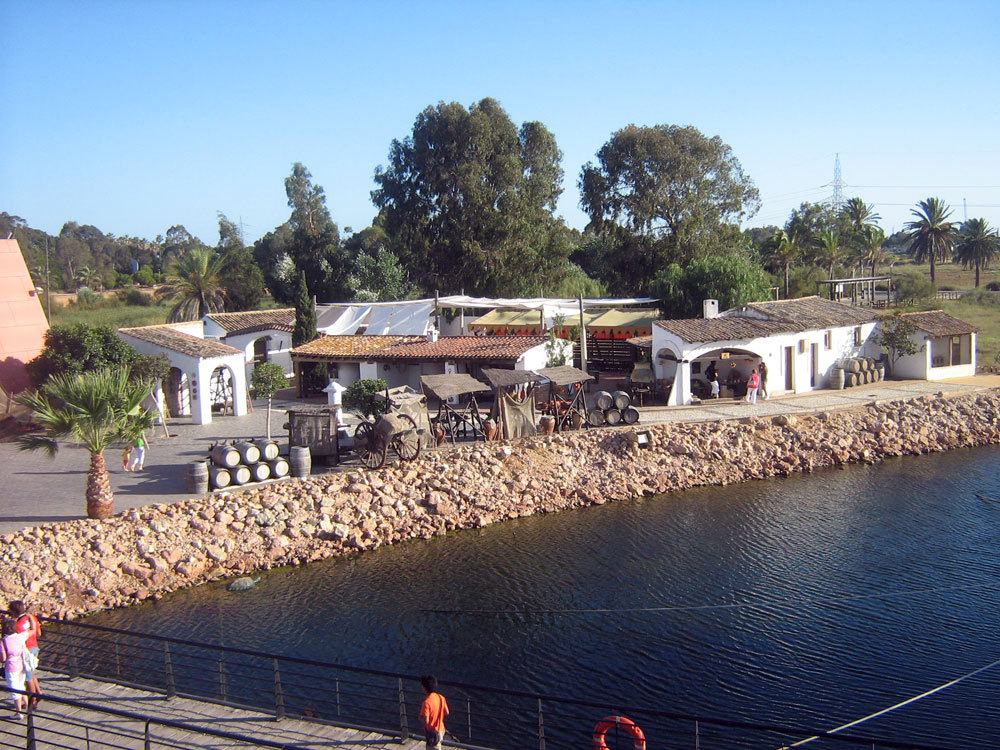 Barrio medieval de El Muelle de las Carabelas, que representa como sería la vida en el momento del descubrimiento.